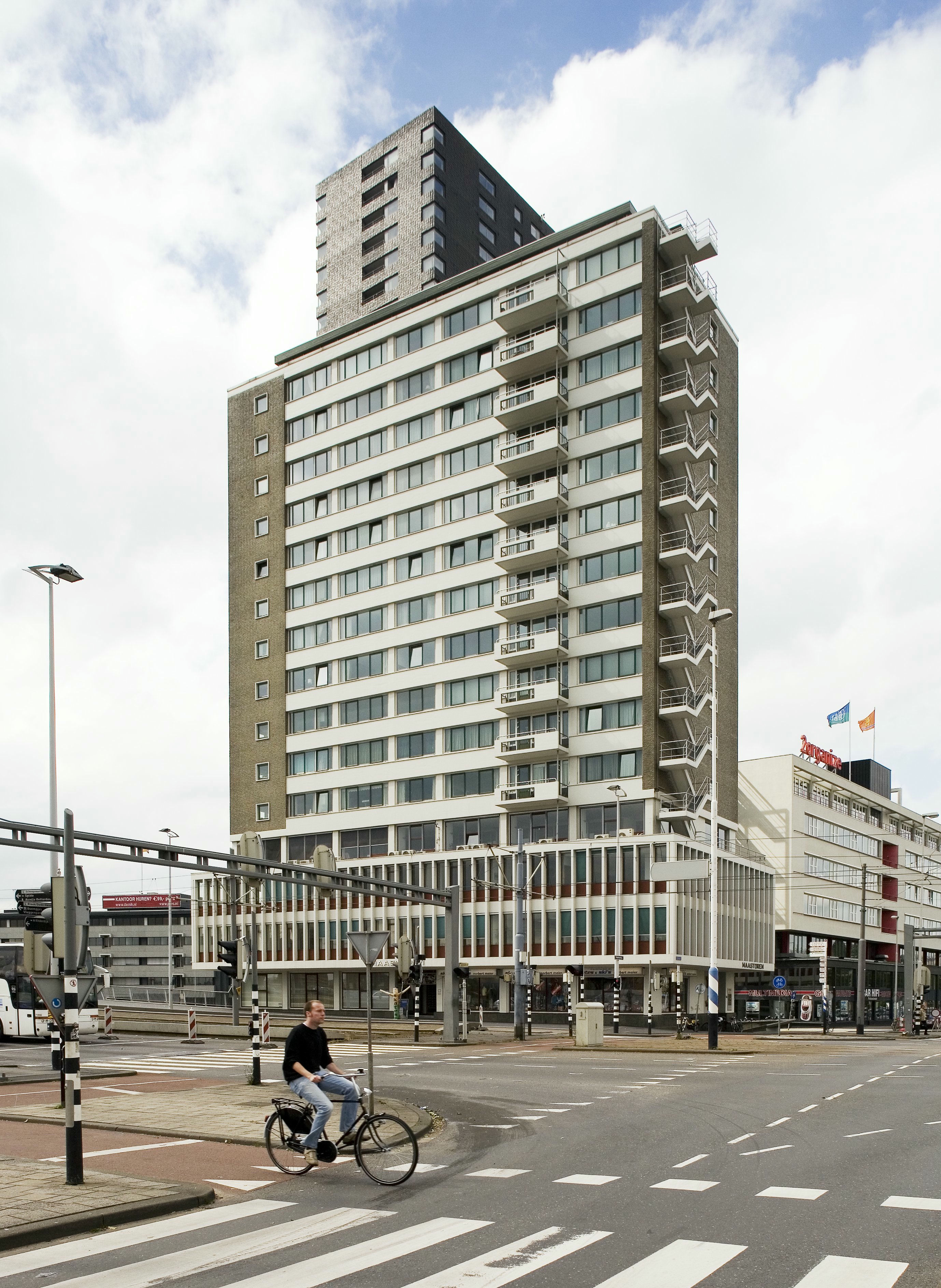 Maastorenflat: Overzicht van de voorgevel, gezien vanaf het kruispunt (opmerking: Gefotografeerd voor Monumenten van Herrezen Nederland)